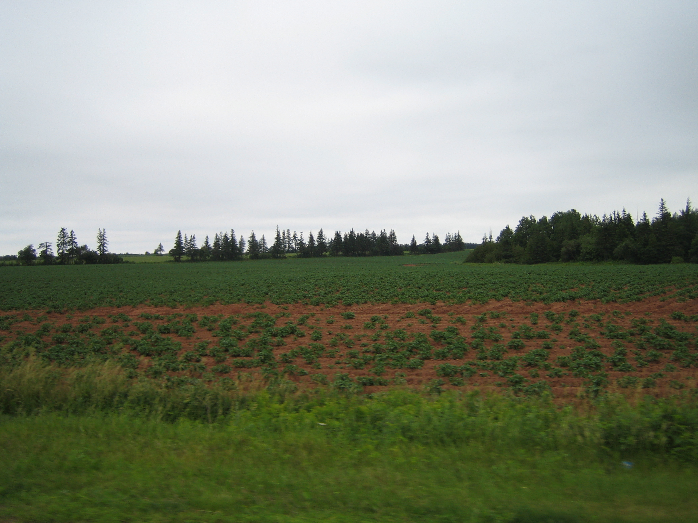 PEI Potato field